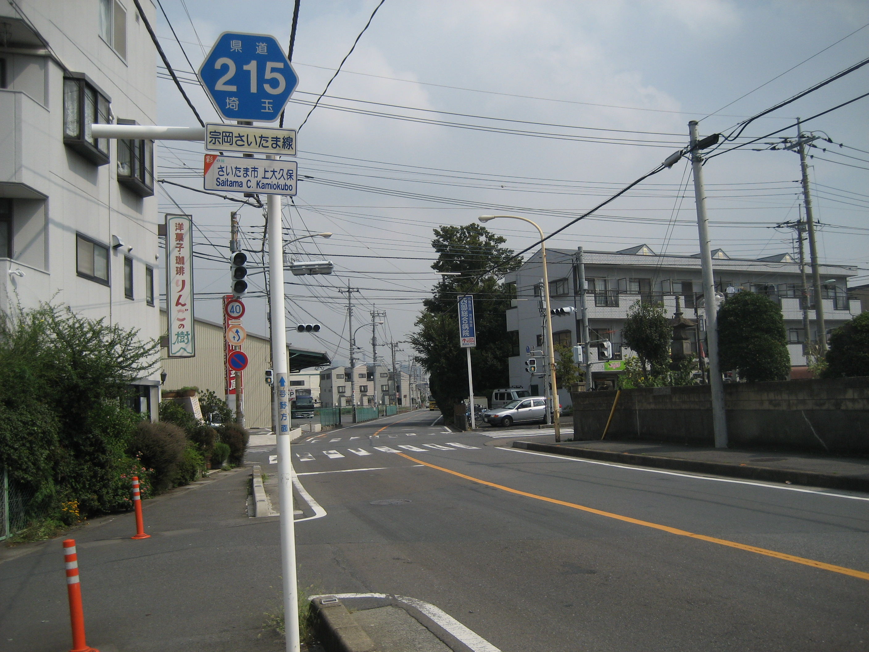 埼玉県道215号線さいたま市桜区上大久保付近